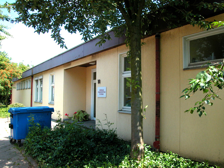 Die Straße «Balckestraße» in Benrath, Düsseldorf